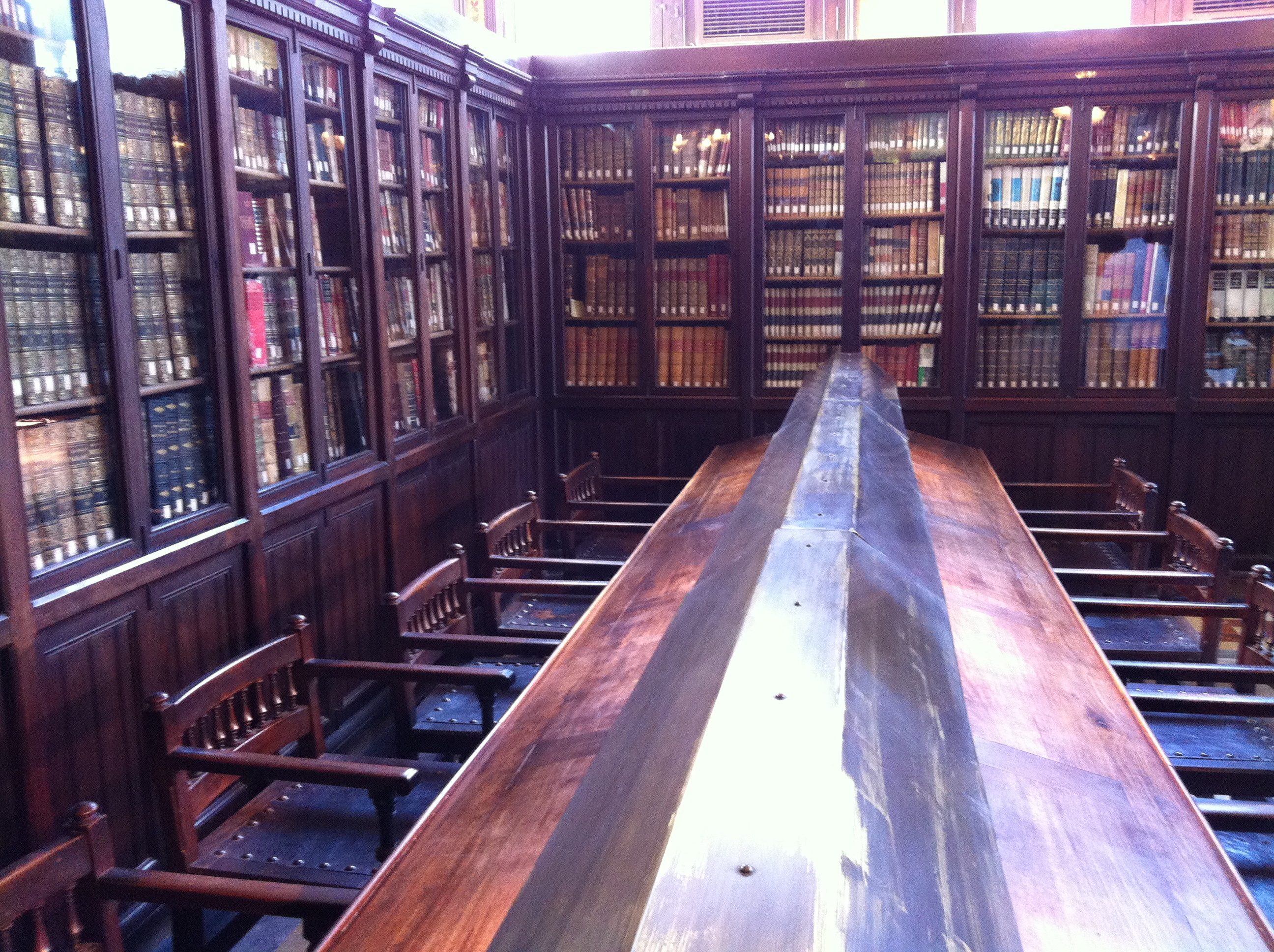 Biblioteca Pública Arús, situada al Passeig Sant Joan de Barcelona